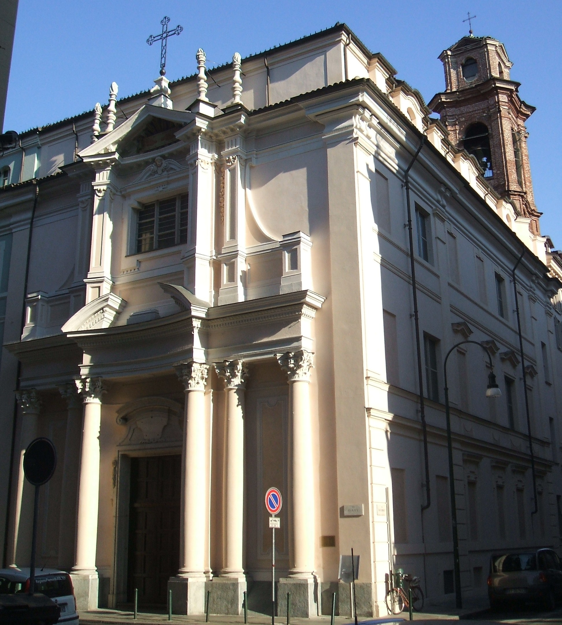 Chiesa del Santissimo Sudario di Torino (Via Piave)